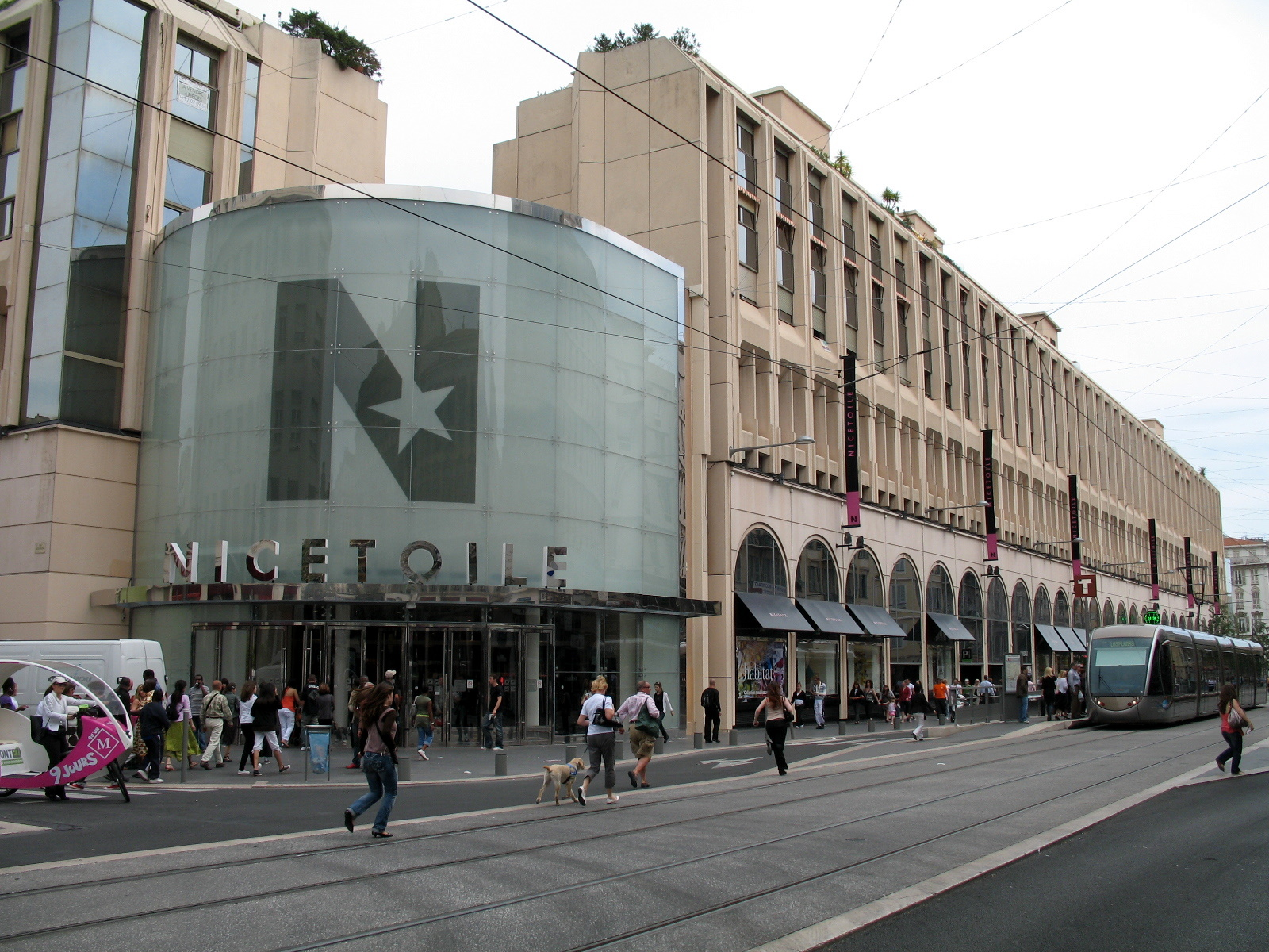 Le centre commercial Nicetoile sur l'avenue Jean Médecin à Nice (France).